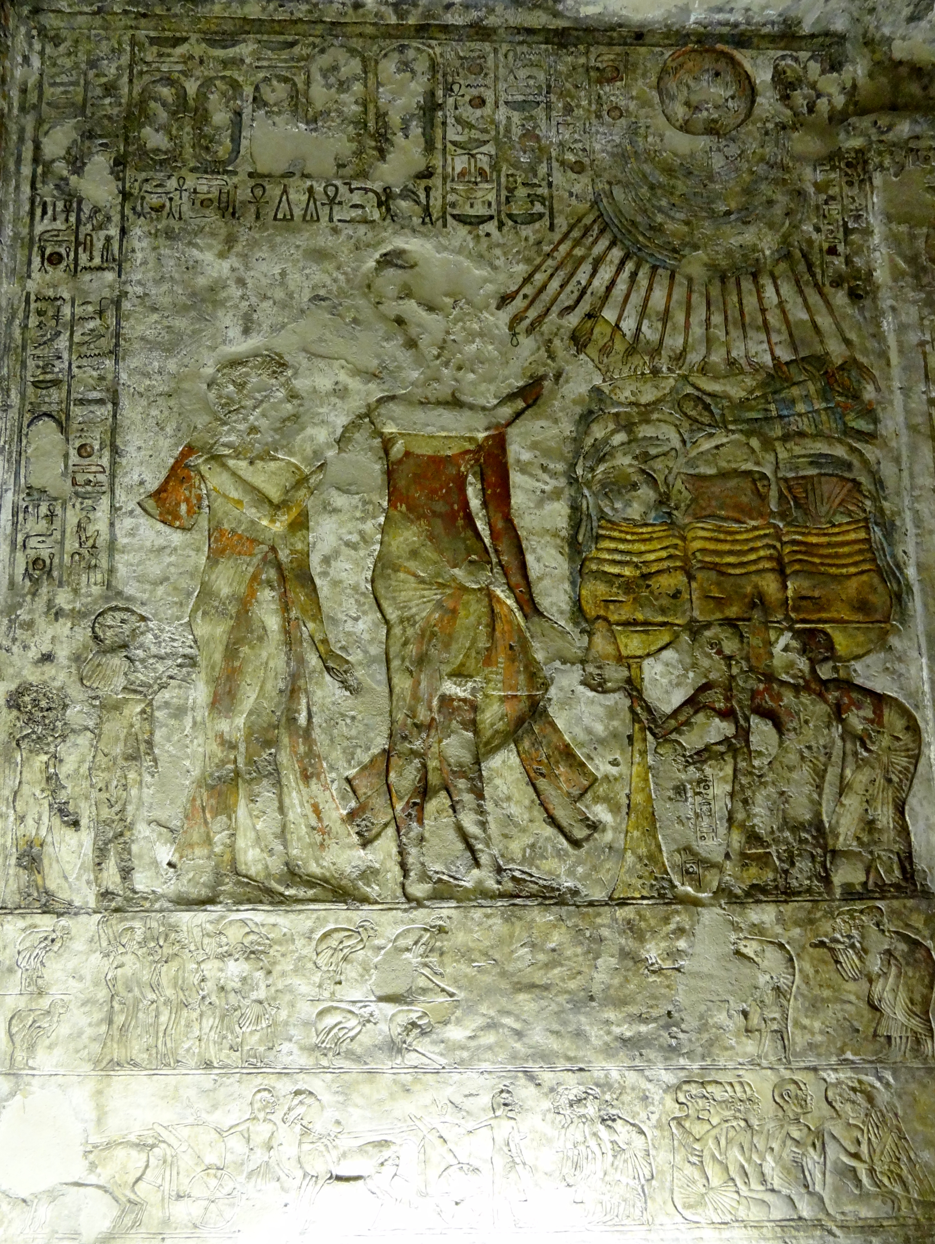 Grab des Merire I. (TA 4) in Tell el-Amarna, Ägypten